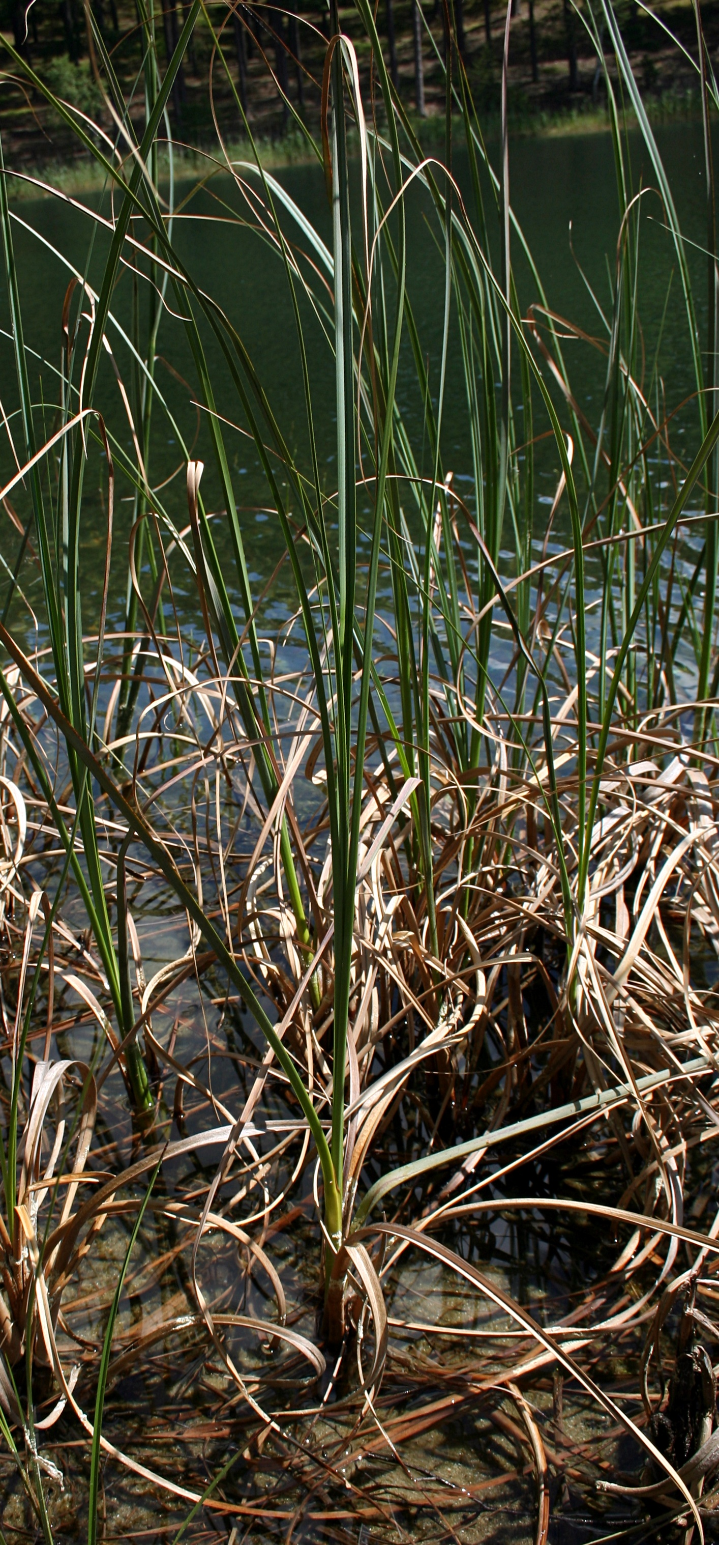 Zaborski Park Krajobrazowy, pokrój i siedlisko kłoci wiechowatej